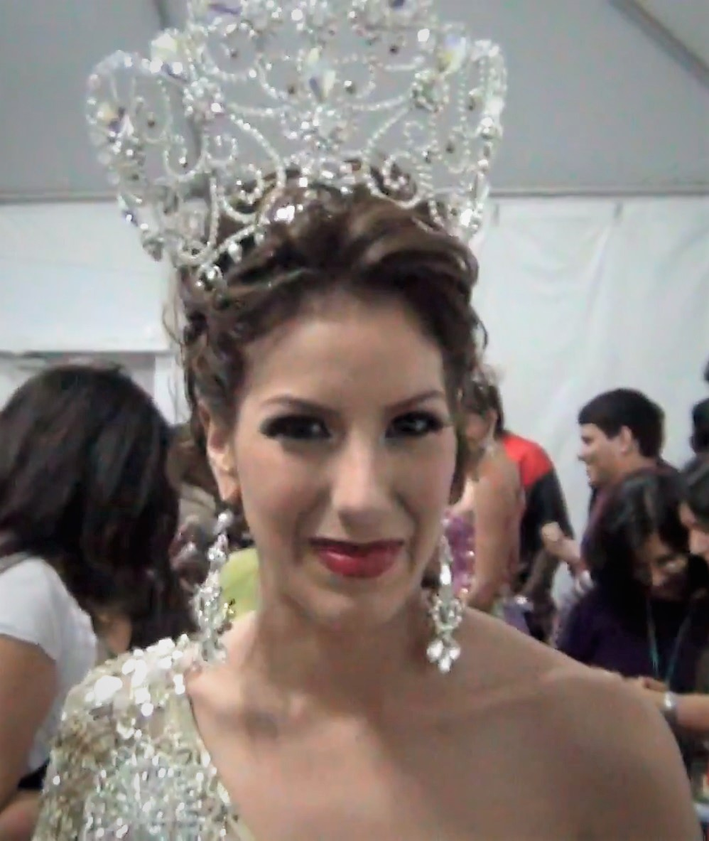 Panama: Reina Virginia Hernández Saludo s .ar El saludo especial de la Reina del Carnaval de la City, el más importante de Panamá y de América Central. Durante un breve descanso en bambalinas, grabó este simpático saludo para los lectores de .ar y su director Julio Ramírez